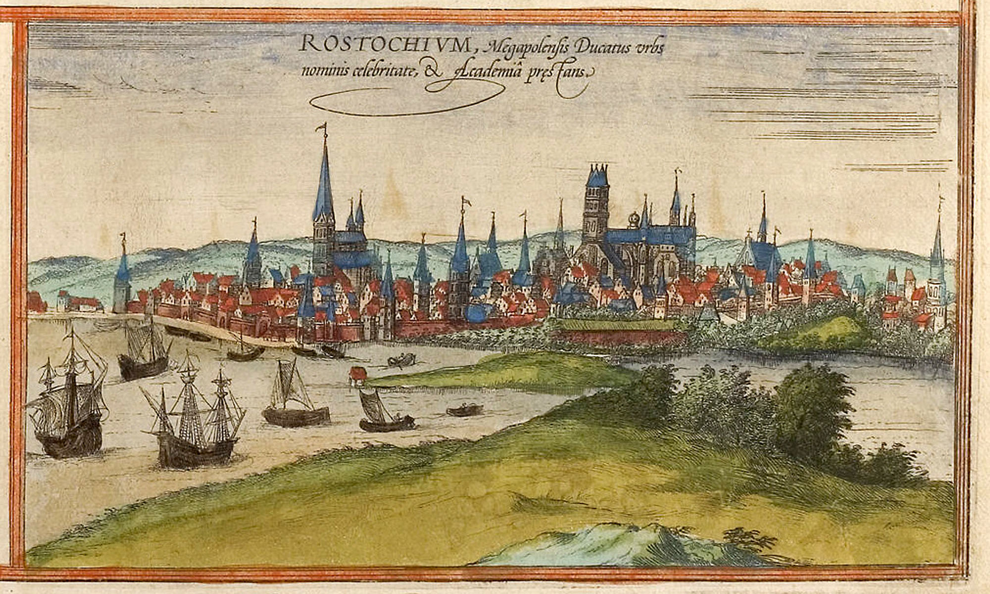 Entgegen der Überschrift Rostochium (Rostock) handelt es sich um eine Ansicht von Wismar. Die mit Wismaria (Wismar) betitelte Ansicht zeigt dementsprechend Rostock. Braun und Hogenberg verwechselten die Namen der Städte auf den beiden Ansichten.